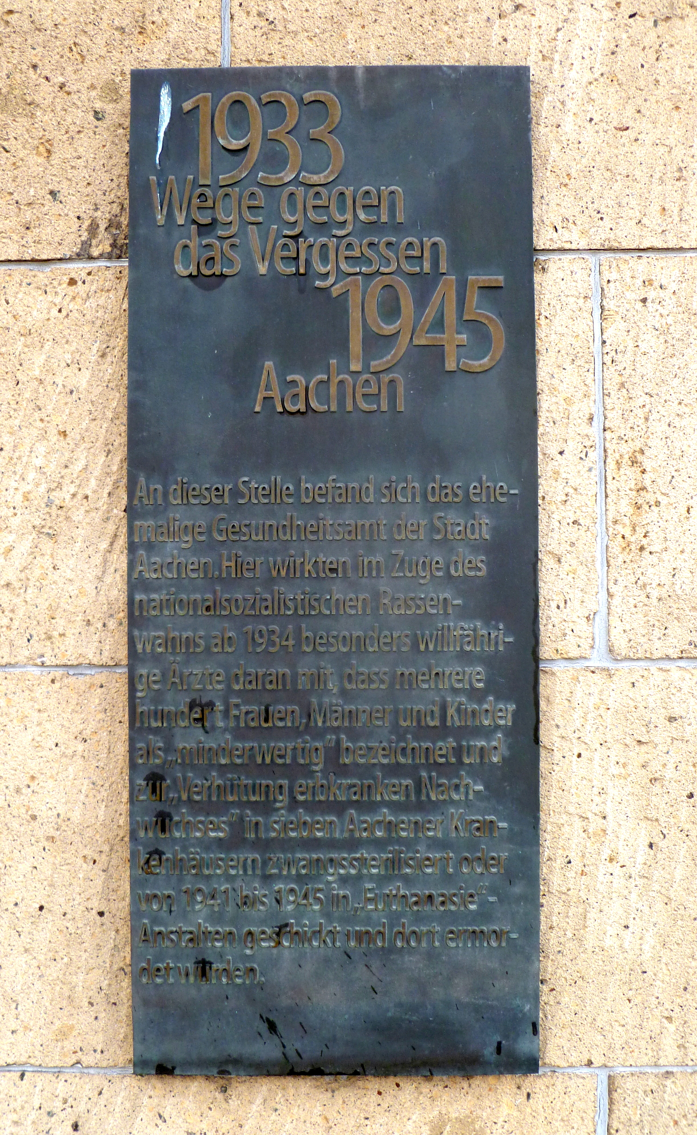 Gedenktafel im Rahmen "Wege gegen das Vergessen" am Verwaltungsgebäude in Aachen, Bahnhofsplatz